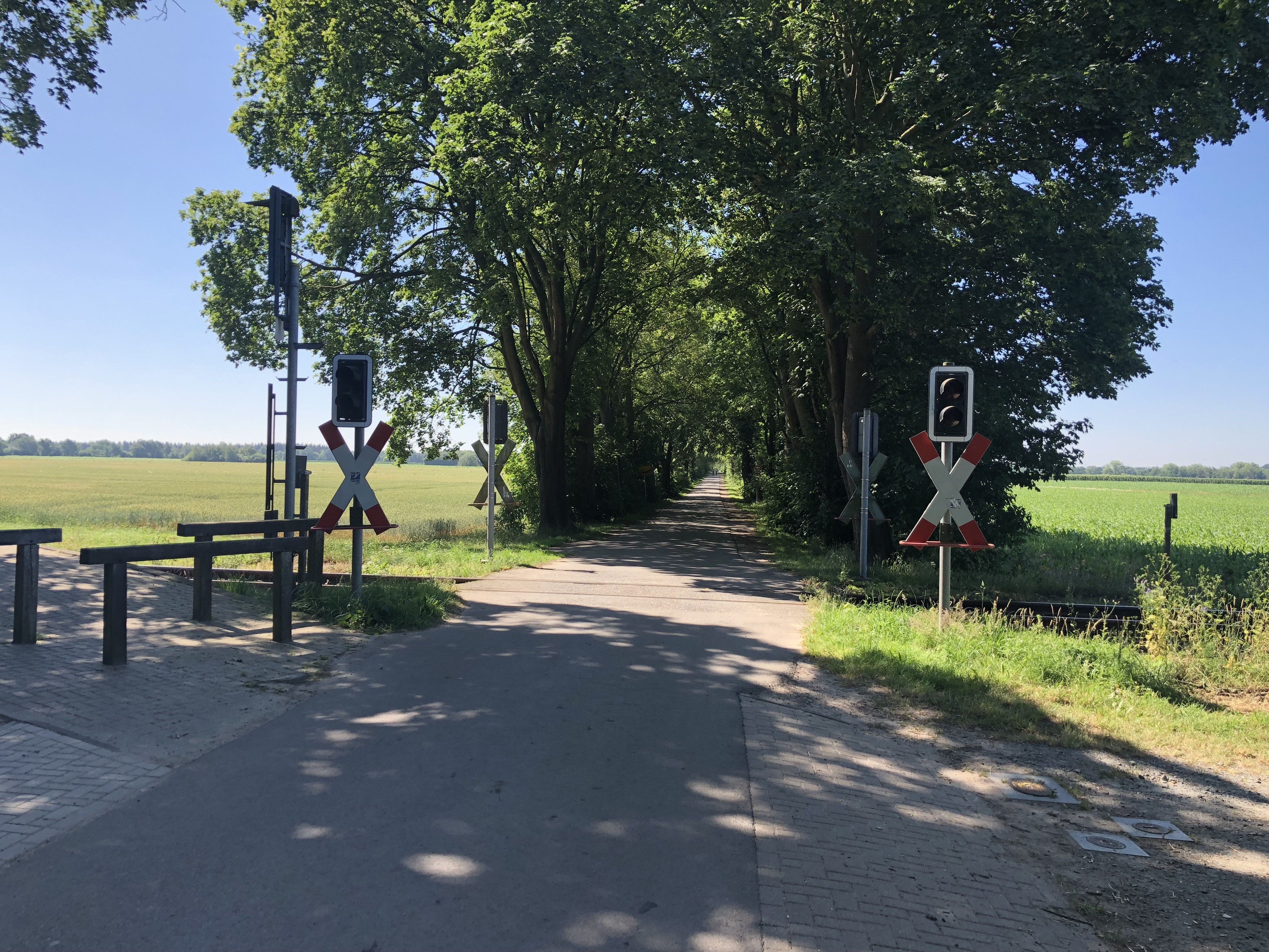 Bahnövergang an’n Bahnhoff in Ruschwedel